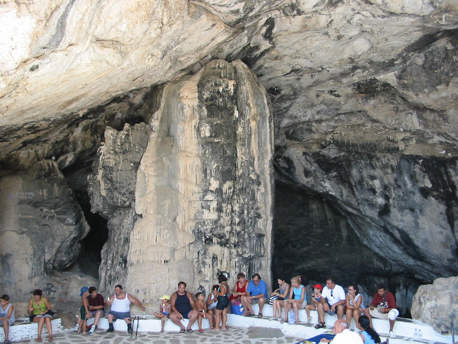 antiparos le grotte